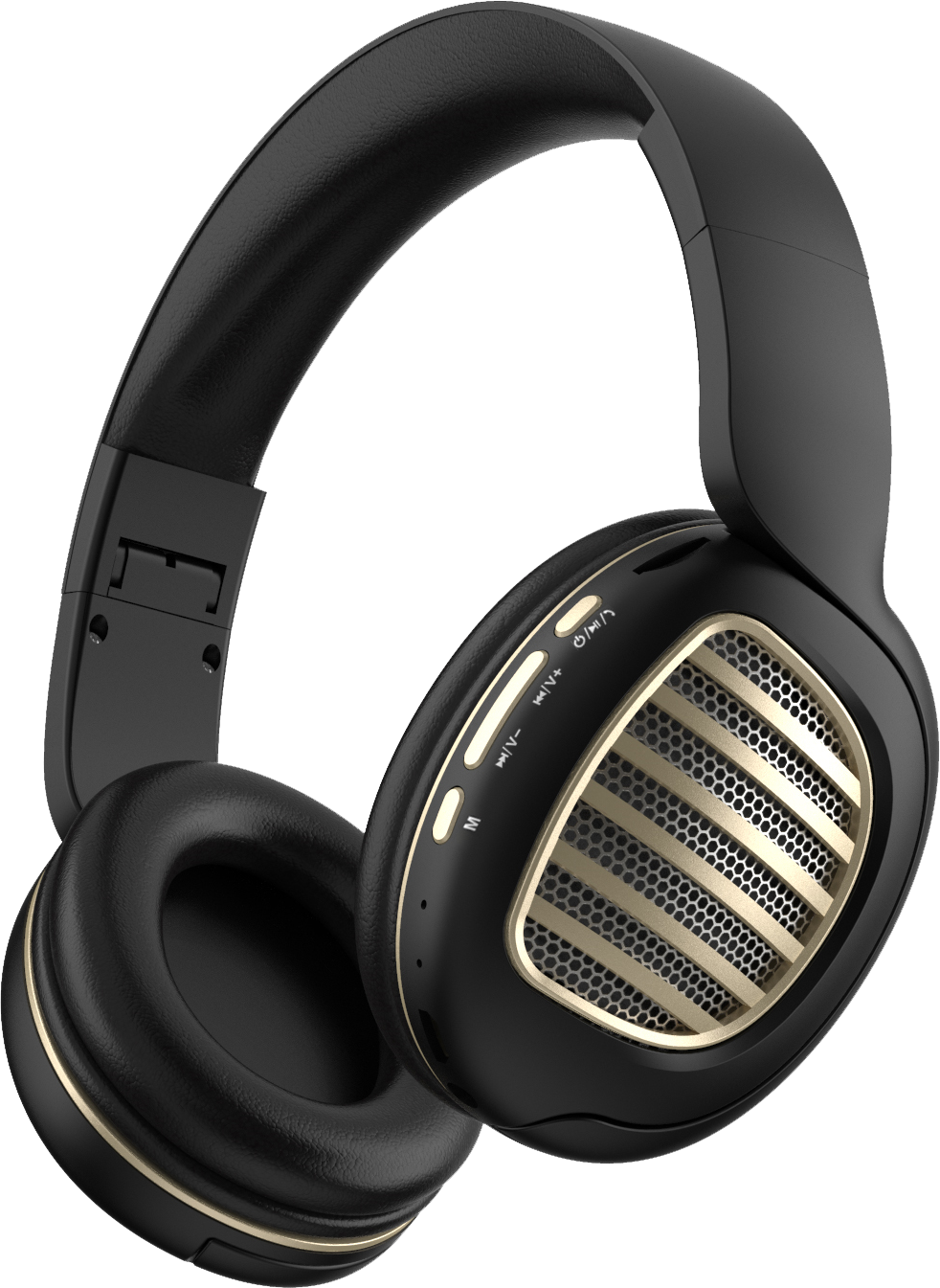 Handsfree JETE Extreme-06